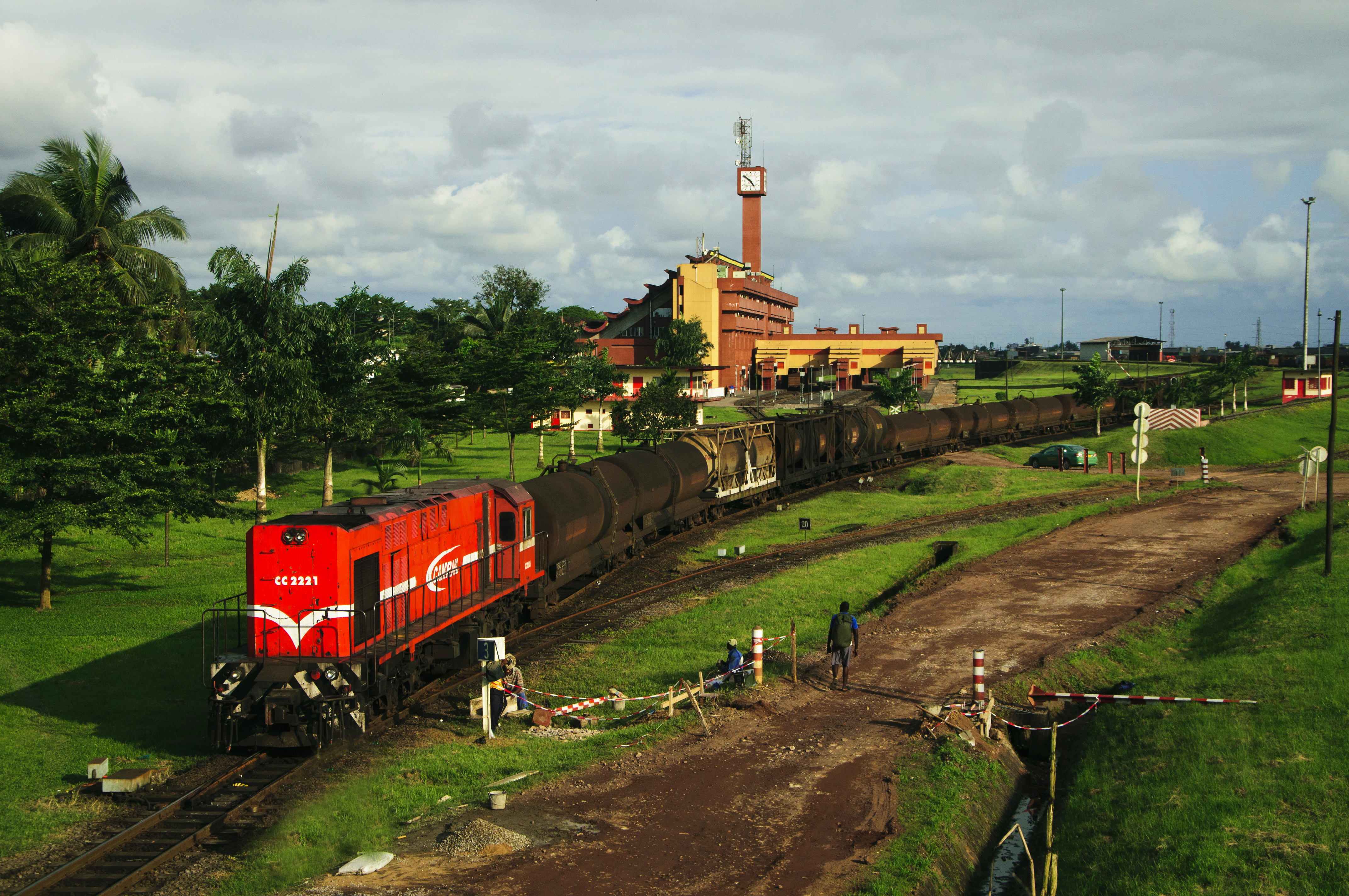 Gare de Bessengué